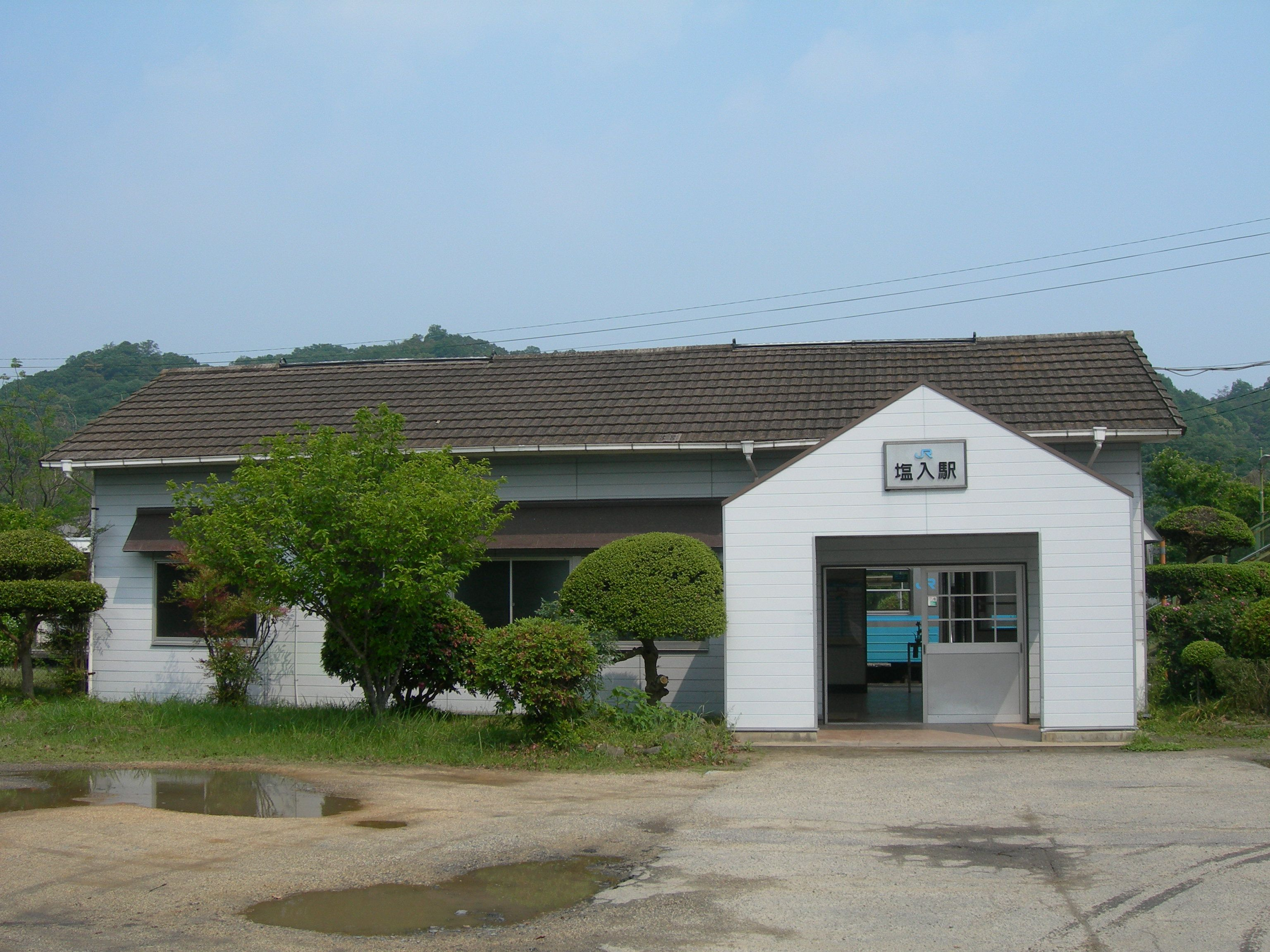 塩入駅